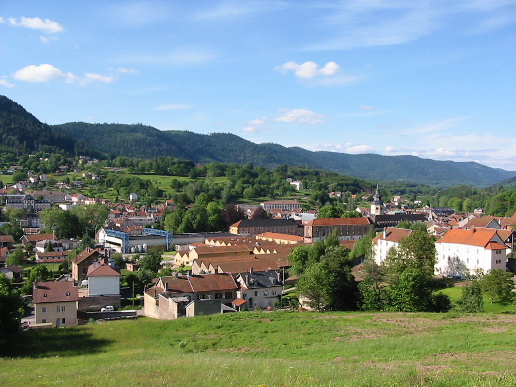 Senones, le centre historique Commune des Vosges Cliché pris depuis Le Petit Paris Photo personnelle du 4 juin 2006. Copyright © Christian Amet